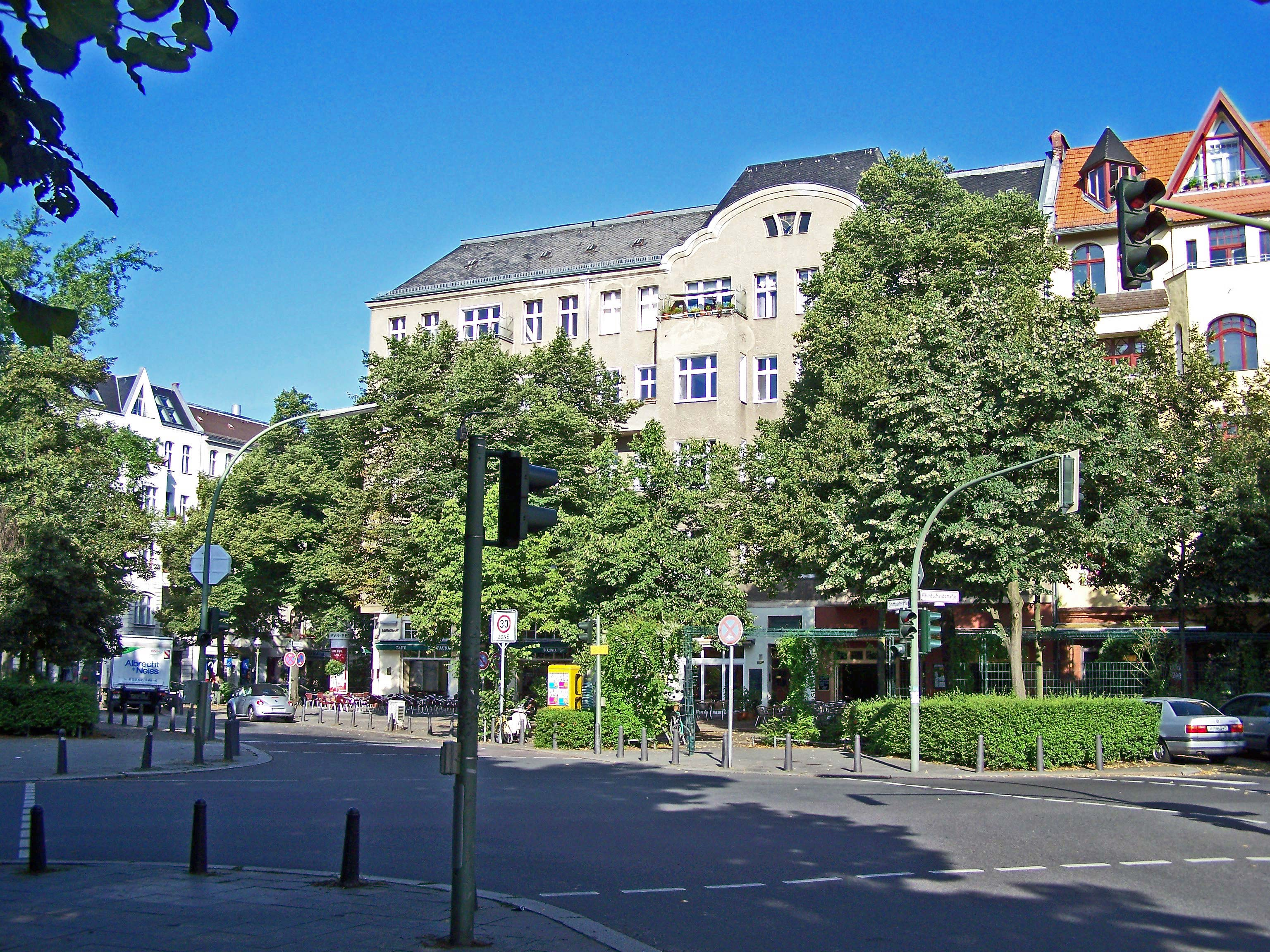 Stuttgarter Platz in Berlin-Charlottenburg